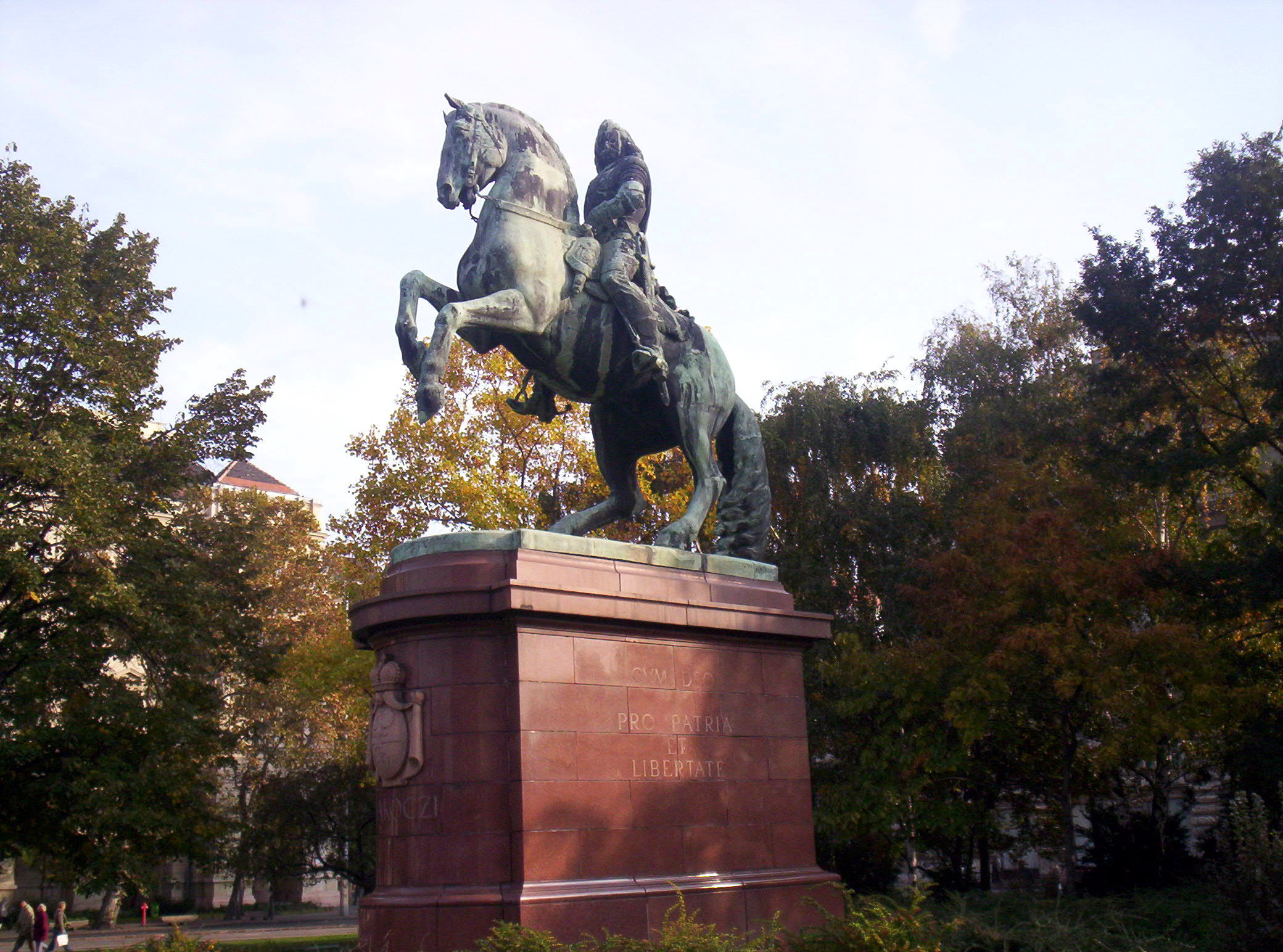 II. Rákóczi Ferenc szobra Budapesten. Pásztor János szobrász és Györgyi Dénes építész alkotása (1937) – photo taken by the uploader 2005